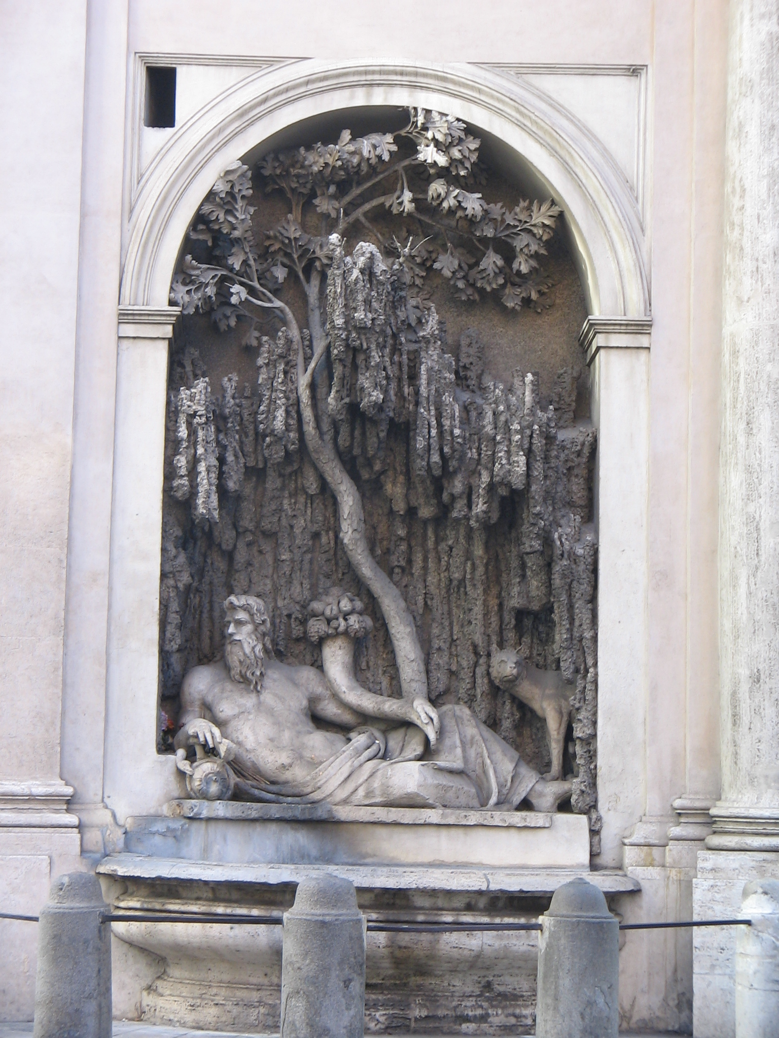 Una delle "Quattro Fontane" di Piazza Quattro Fontane a Roma: il fiume Tevere. A destra si vede La lupa capitolina.